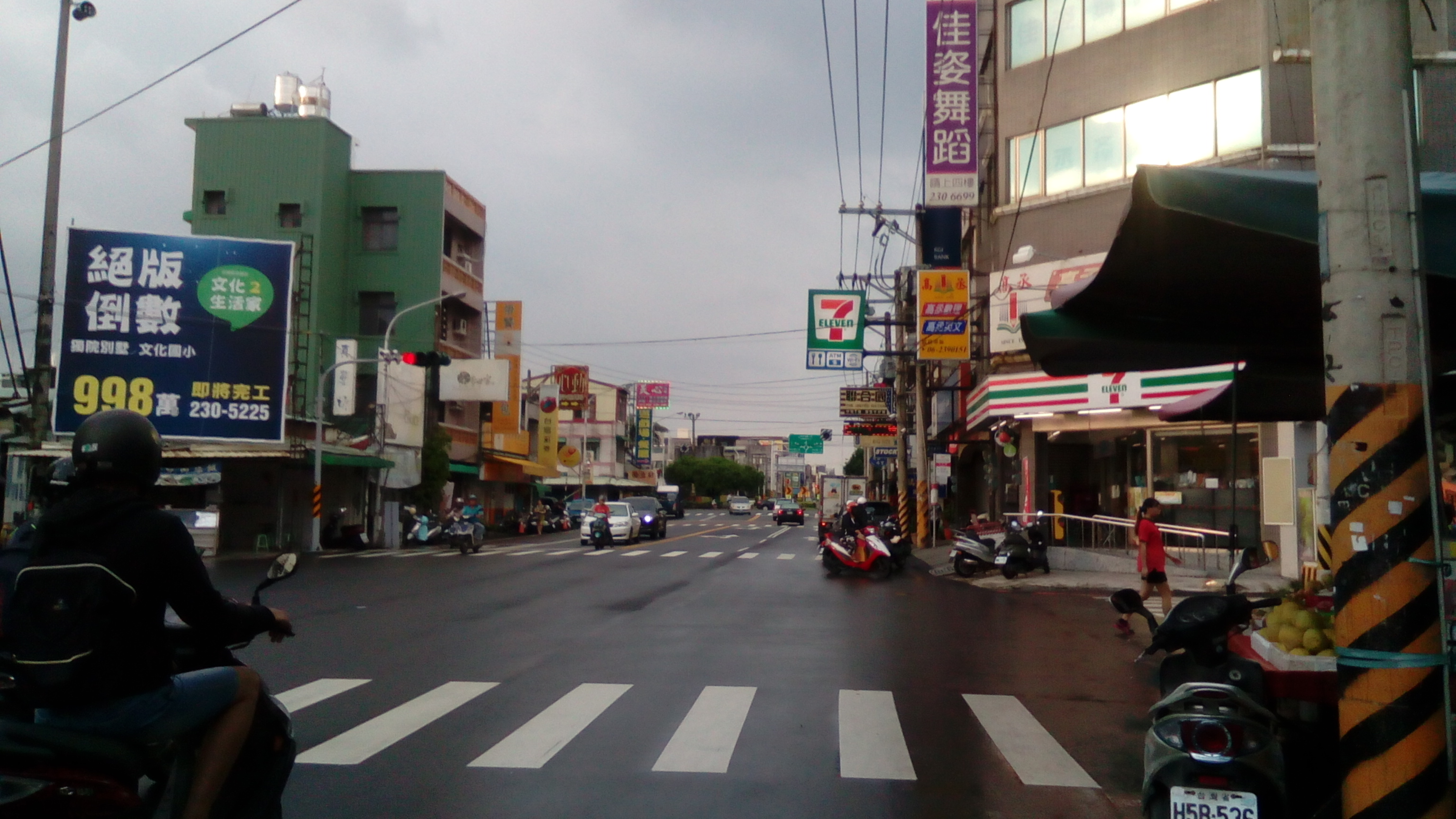 圓環附近